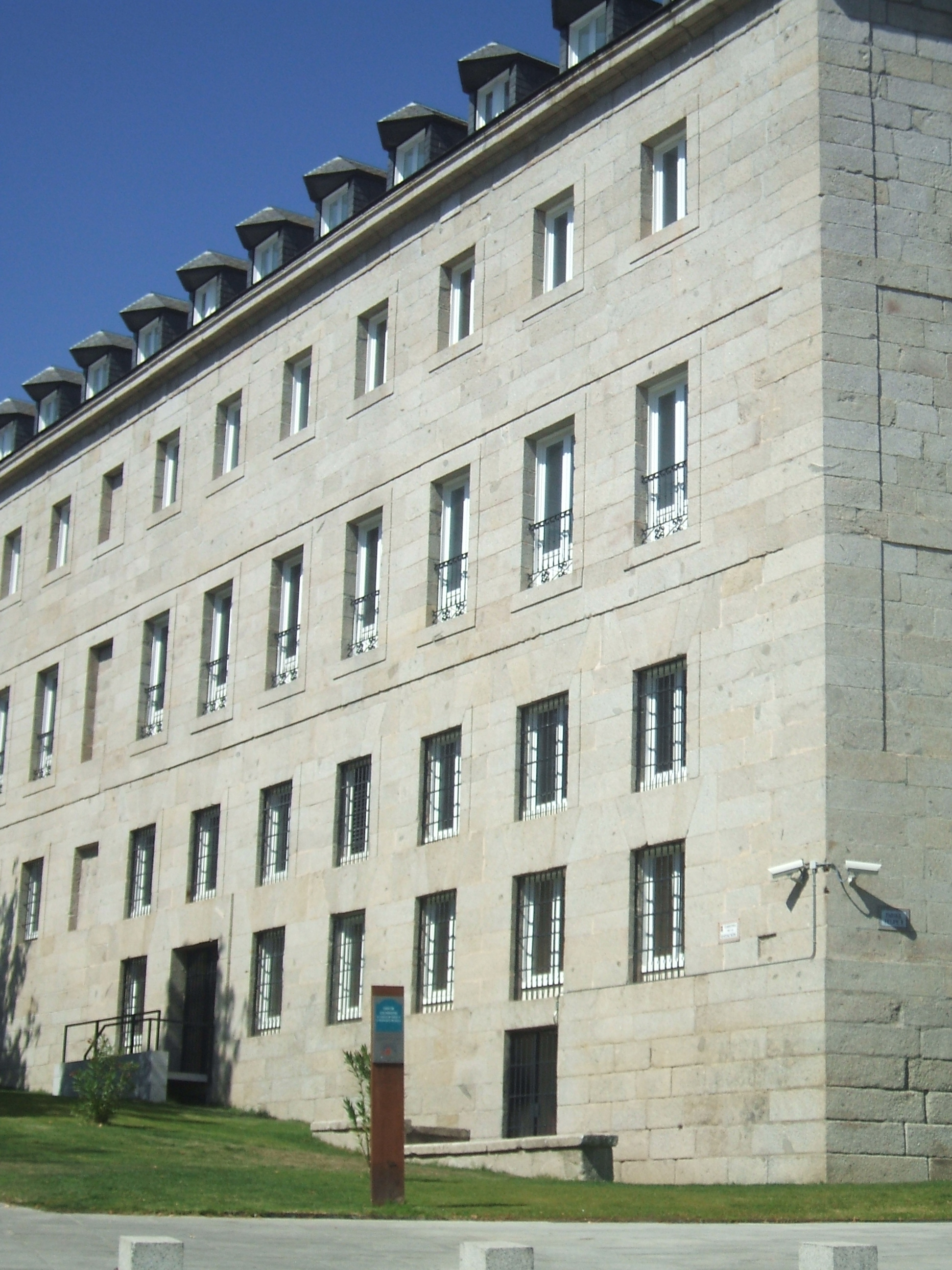 Casa de Peláez - Fachada Suroeste